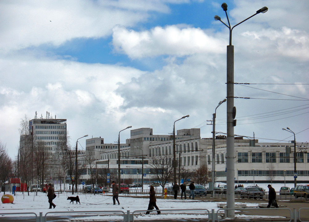 Viciebsk TV plant